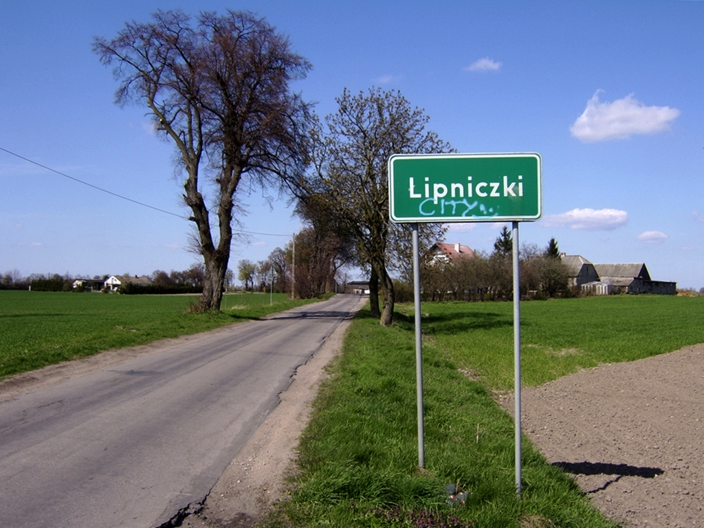 Tablica miejscowości